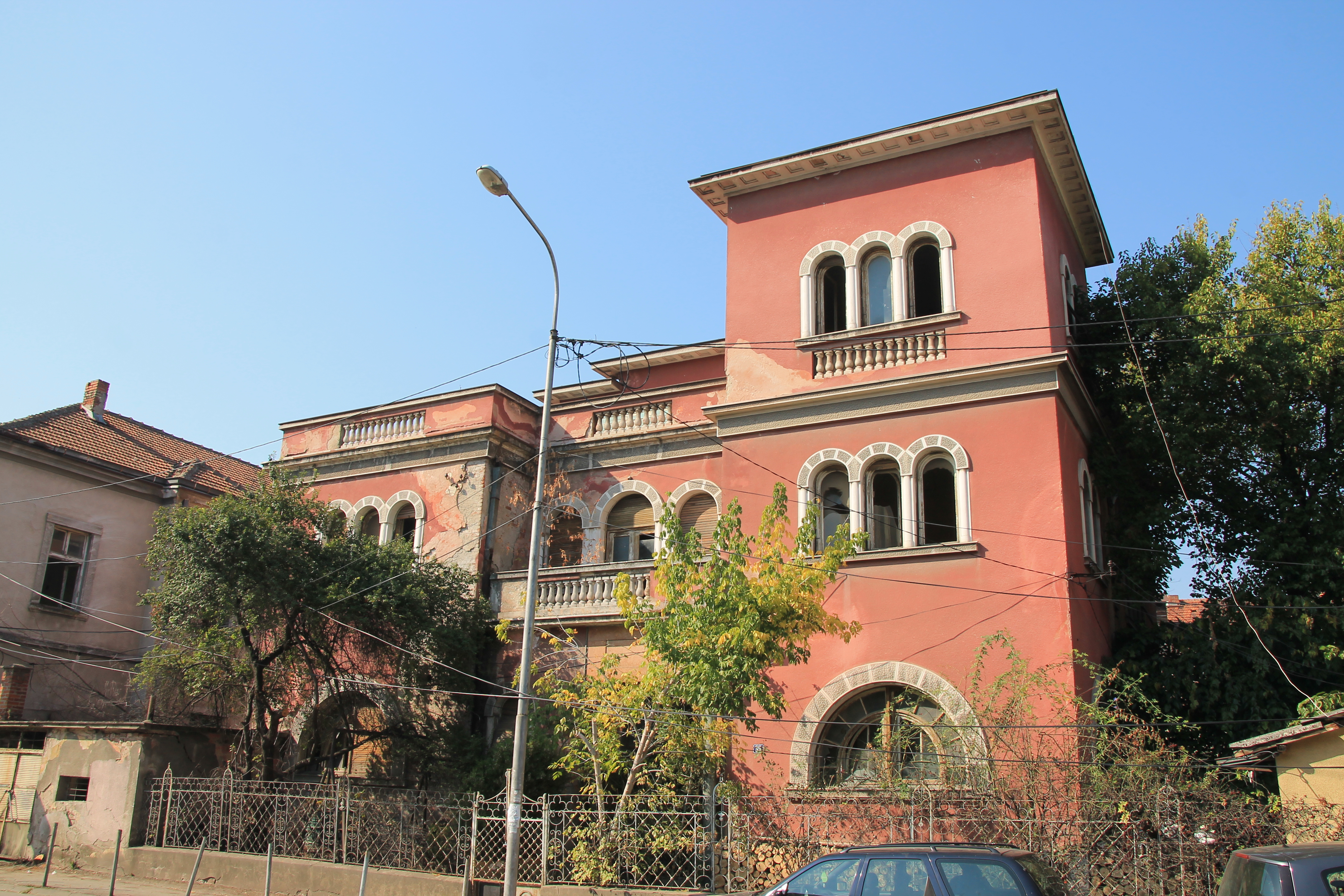 Vila Klefiš u Jagodini